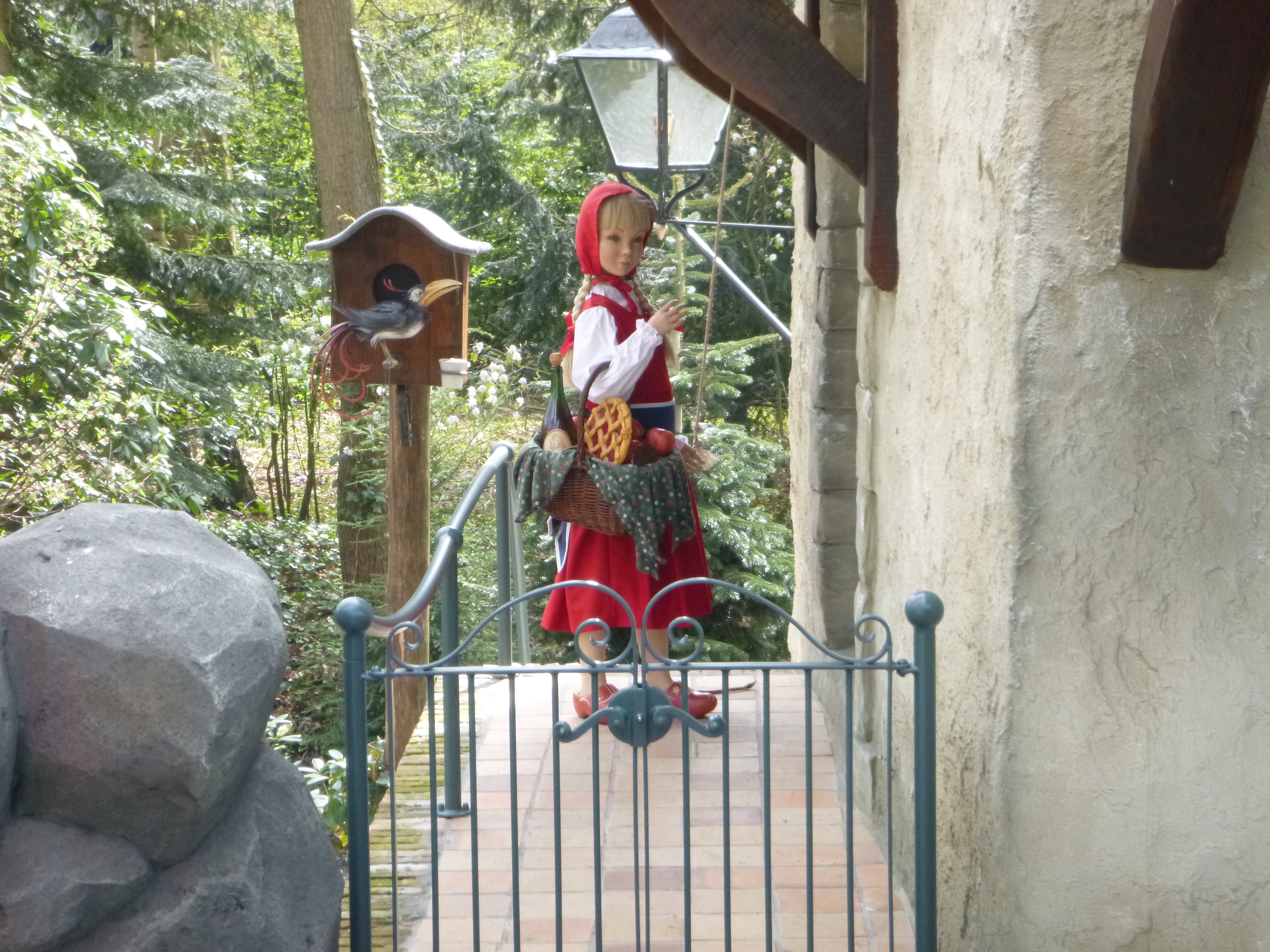 Efteling Chaperon rouge 2017